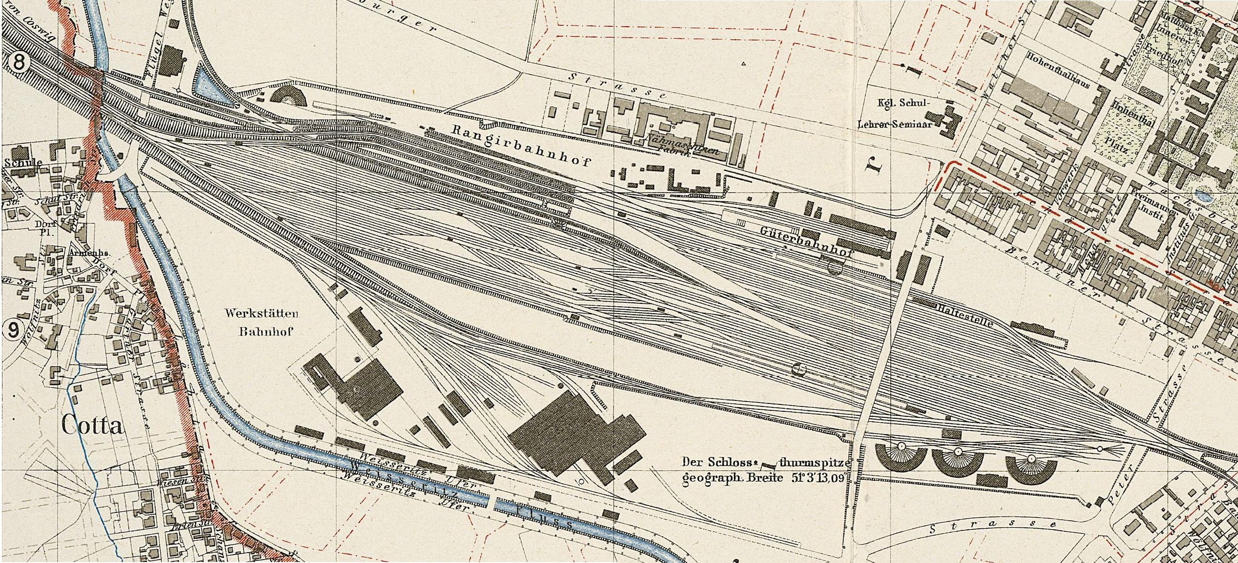 Der Bahnhof Dresden-Friedrichstadt in einem Stadtplan von 1900. Am linken oberen Bildrand befindet sich der Ablaufberg, in der Bildmitte unten das Ausbesserungswerk, am rechten unteren Bildrand das Bahnbetriebswerk und rechts von dem mit Haltestelle markierten Bahnsteig liegt das ehemalige Empfangsgebäude des Berliner Bahnhofs